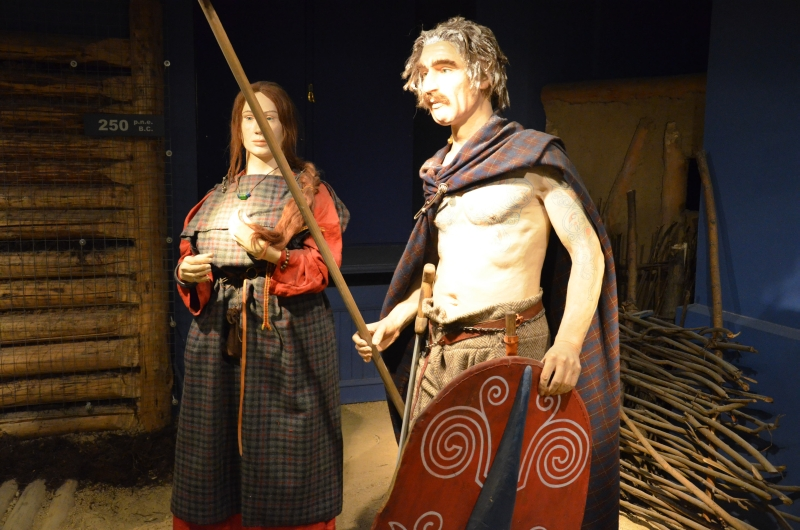 Rekonstruktionsversuch kelticher Trachten